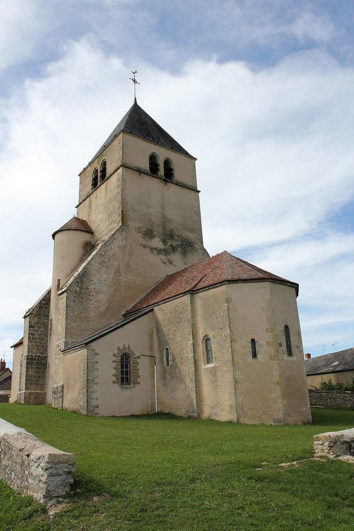 Eglise Saint Symphorien de Bazolles